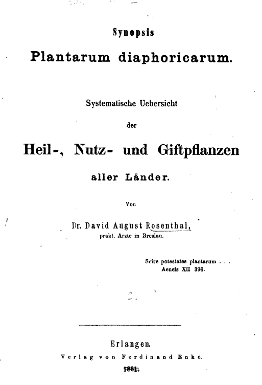 David August Rosenthal, deutsch-jüdischer Konvertit, Arzt und Publizist